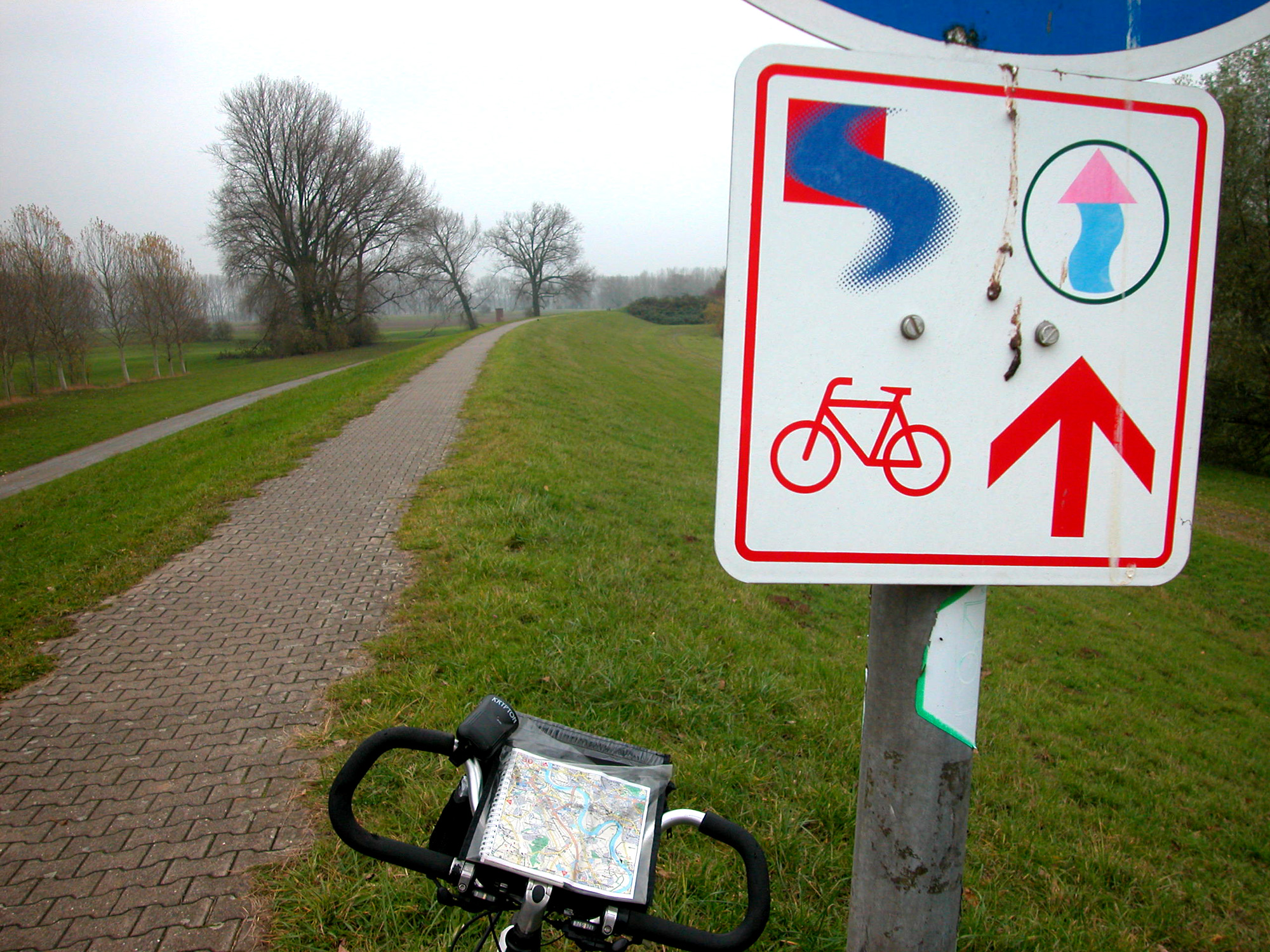 NiederRhein Fahrradroute, NRW, Deutschland